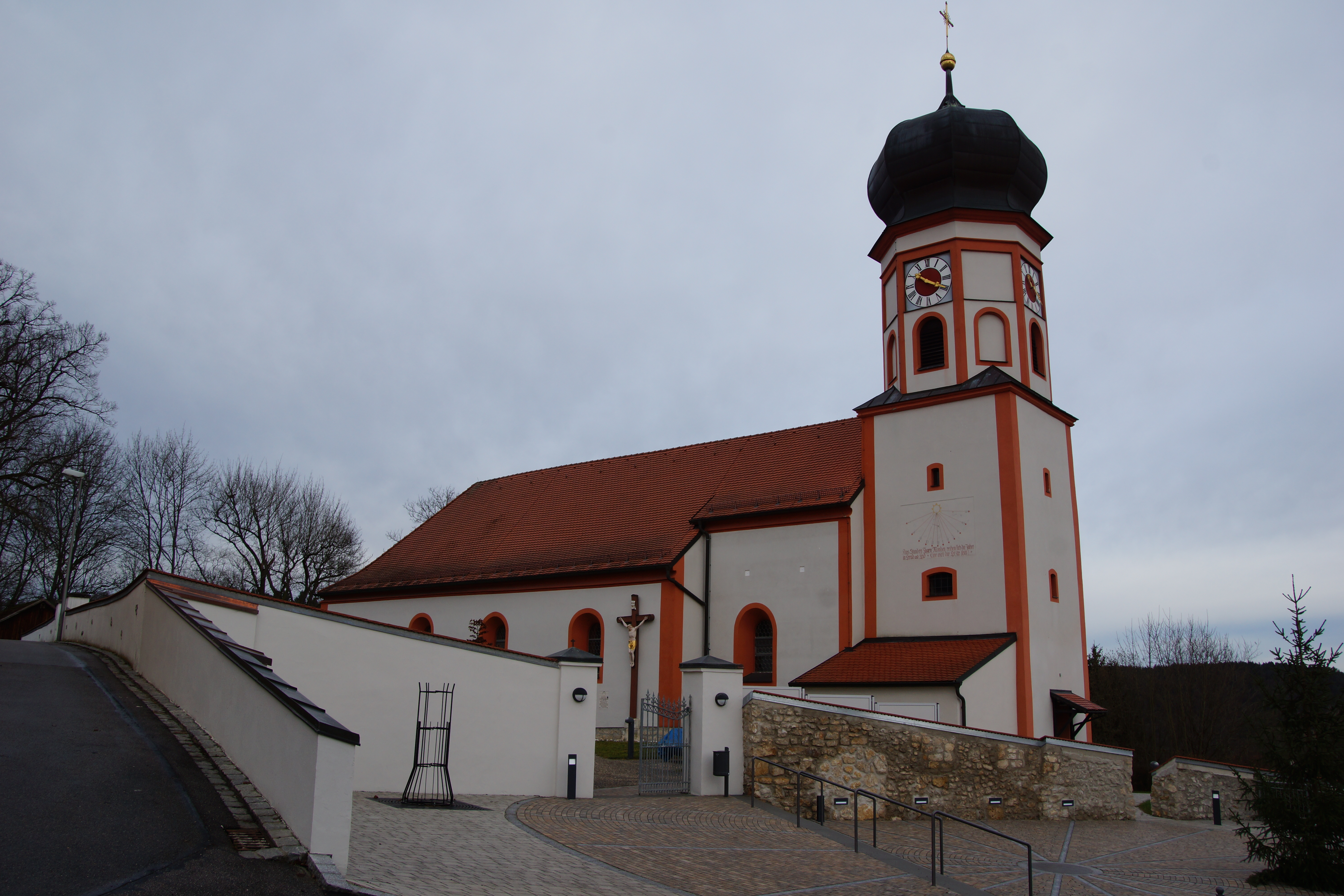 Die katholische Pfarrkirche St. Martin - Deuerling Oberpfalz